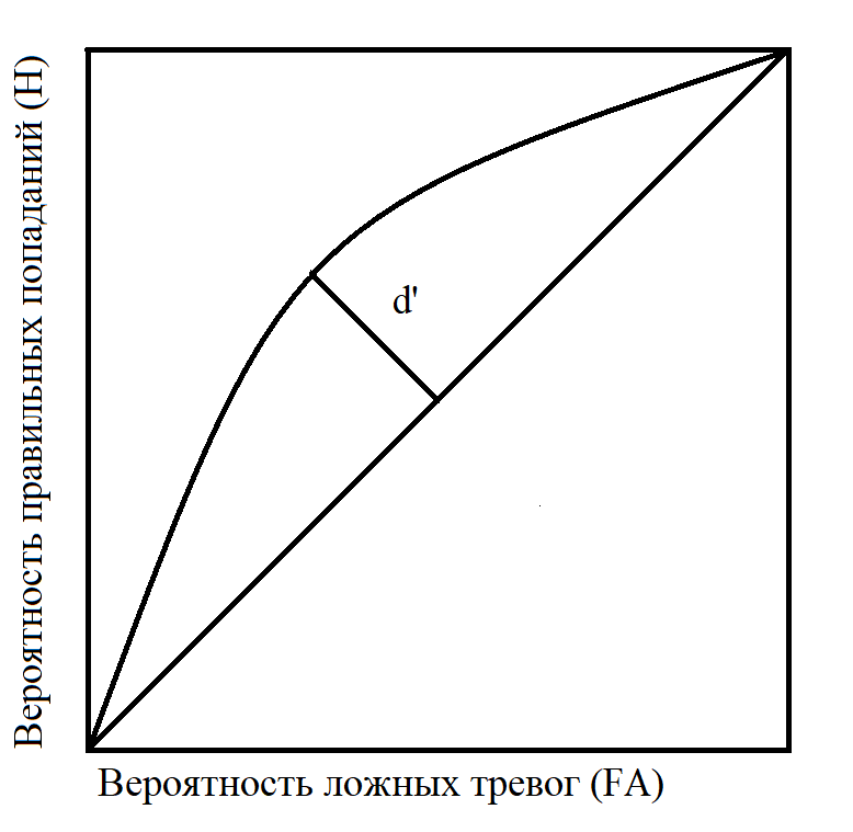 Метод ТОС. РХ - зависимость вероятности попаданий от вероятности ложных тревог.